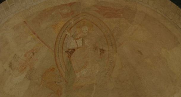 Gros plan sur la fresque murale ornant la voûte d'abside de l'église de Parçay-Meslay.